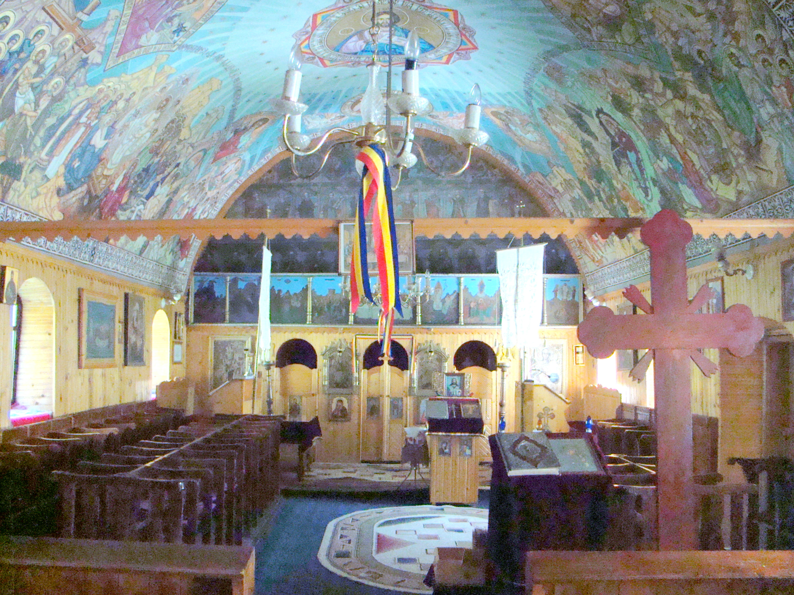 Biserica „Sf. Arhangheli”, sat Vidra; comuna Vidra